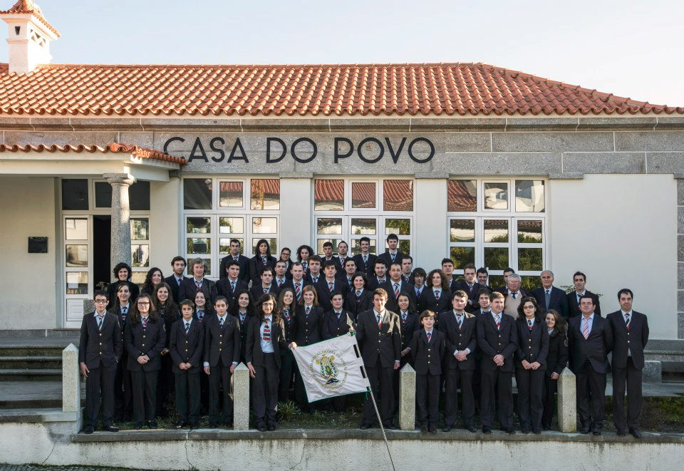 Foto de Grupo da Banda de Santa Marinha só Zêzere